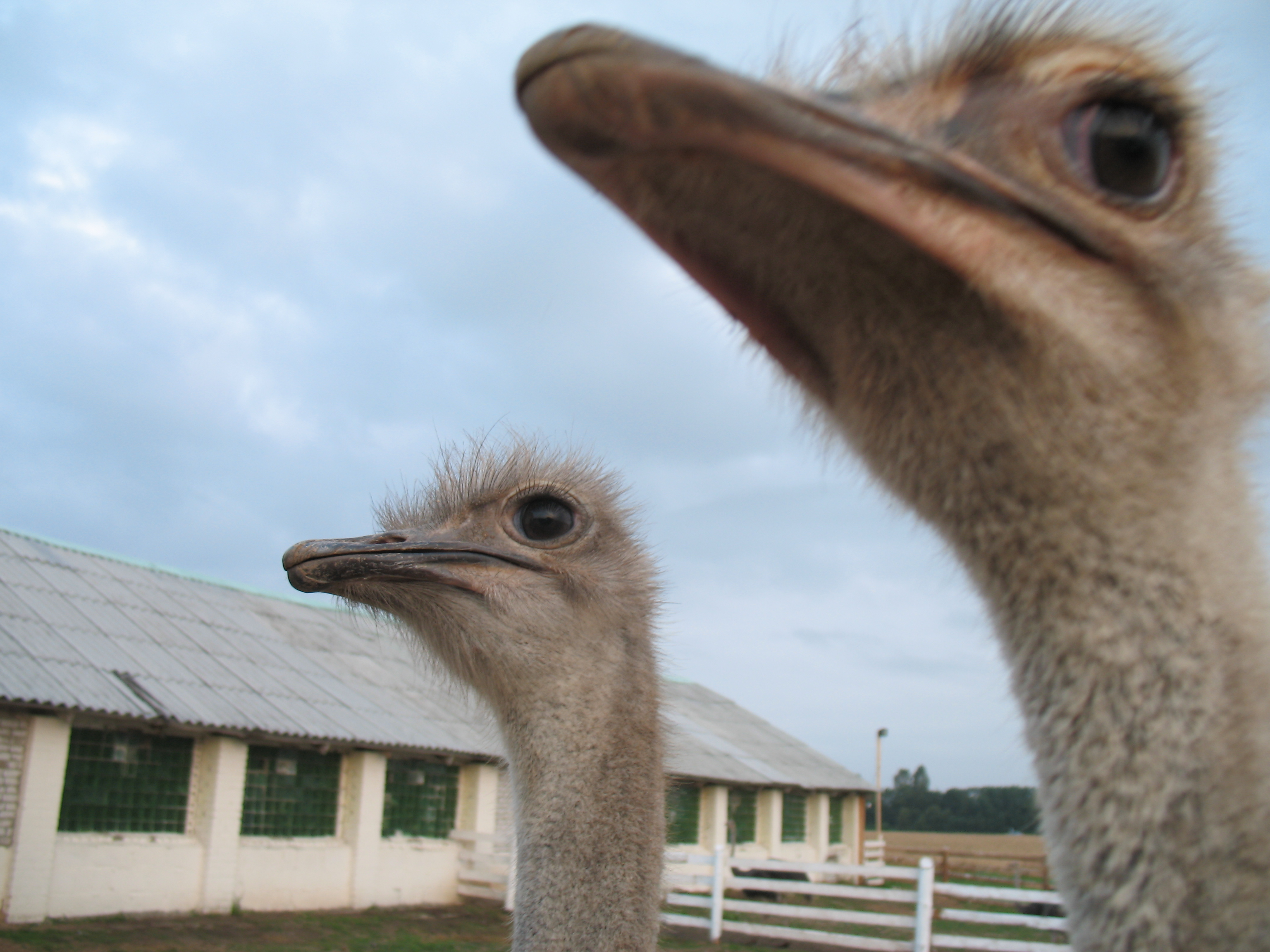 Страусиное ранчо.